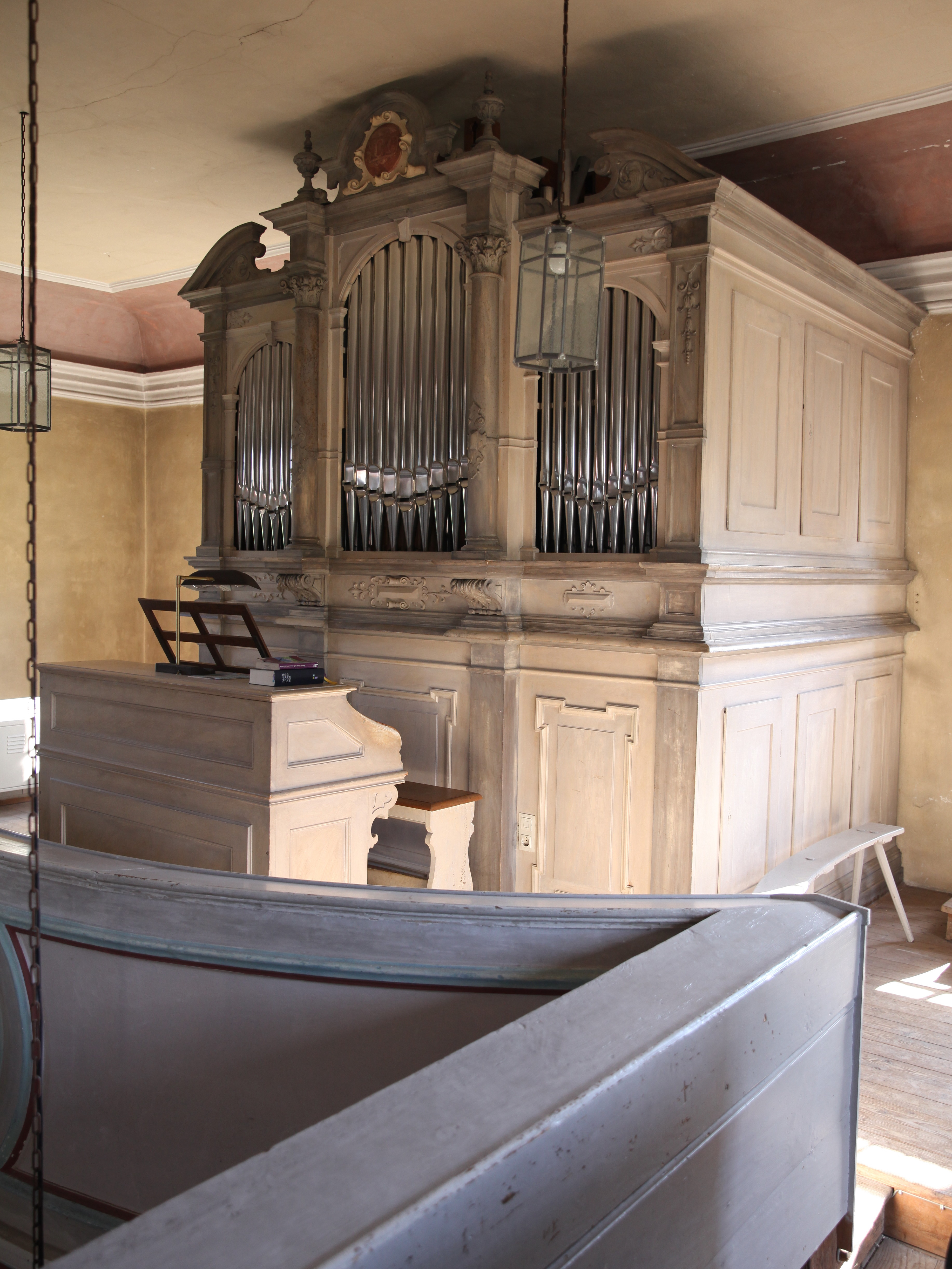 Orgel St. Johannis, Gemünda